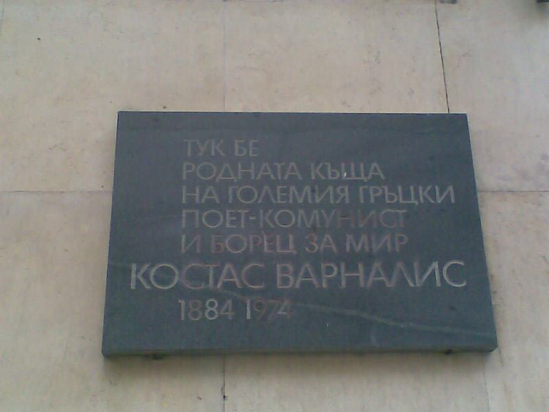 Пaметна плоча на Костас Варналис в град Бургас